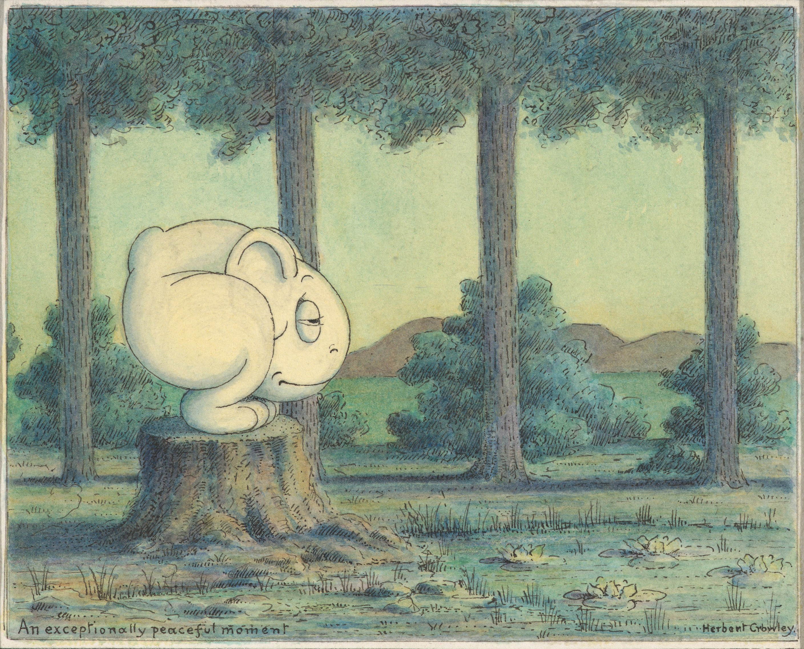 Drawing; Drawings